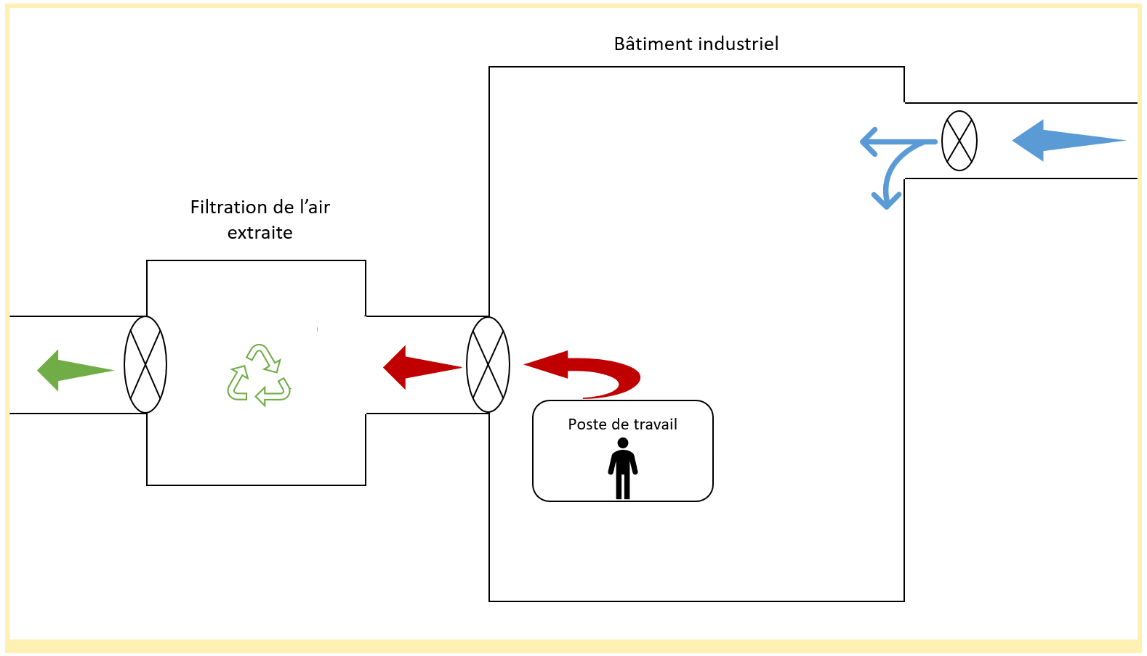 Schéma simpliste d'une ventilation industrielle générale